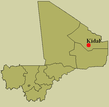 Localisation de Kidal au Mali